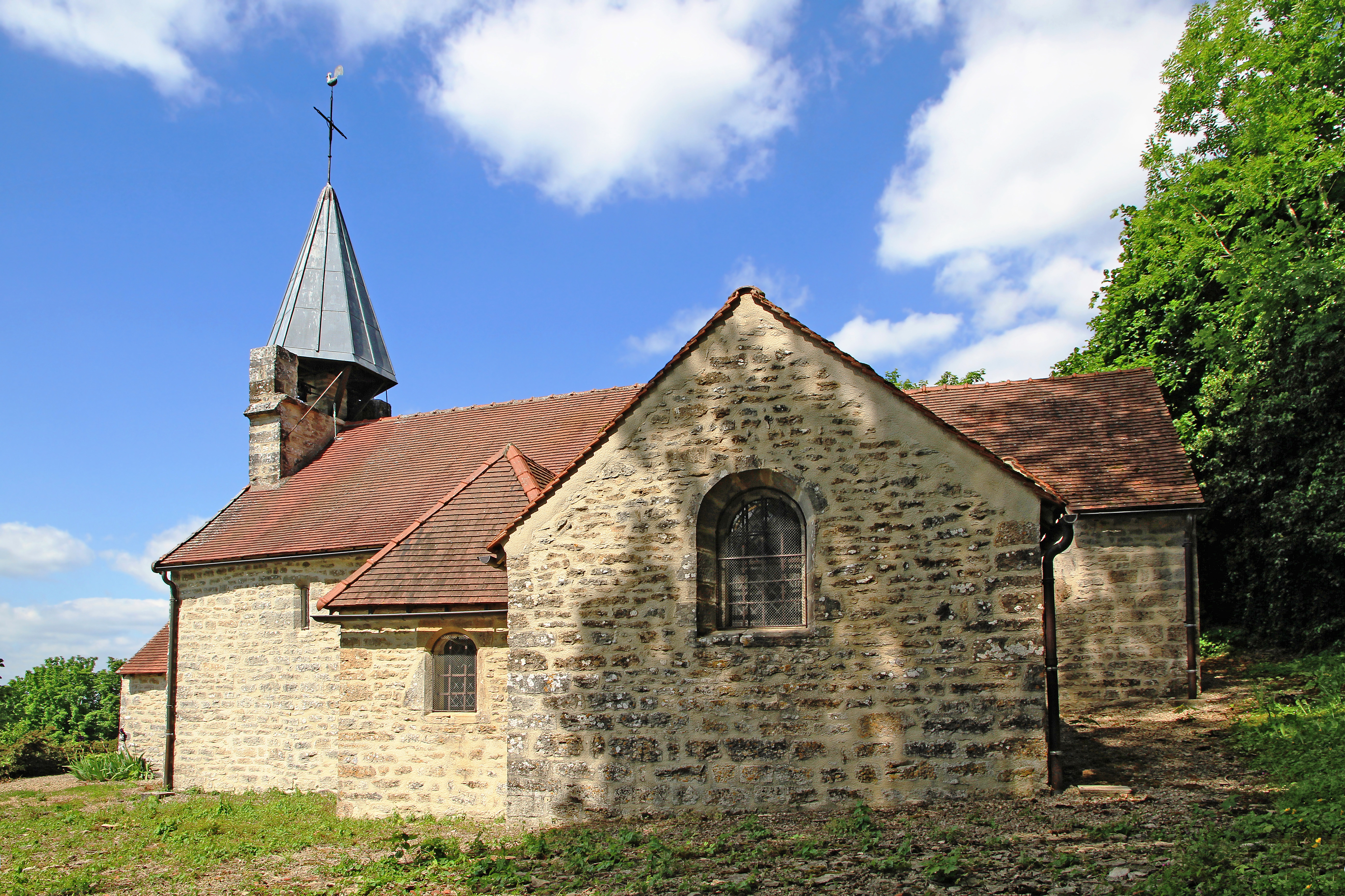 Chapelle Saint-Nicolas de Fontette